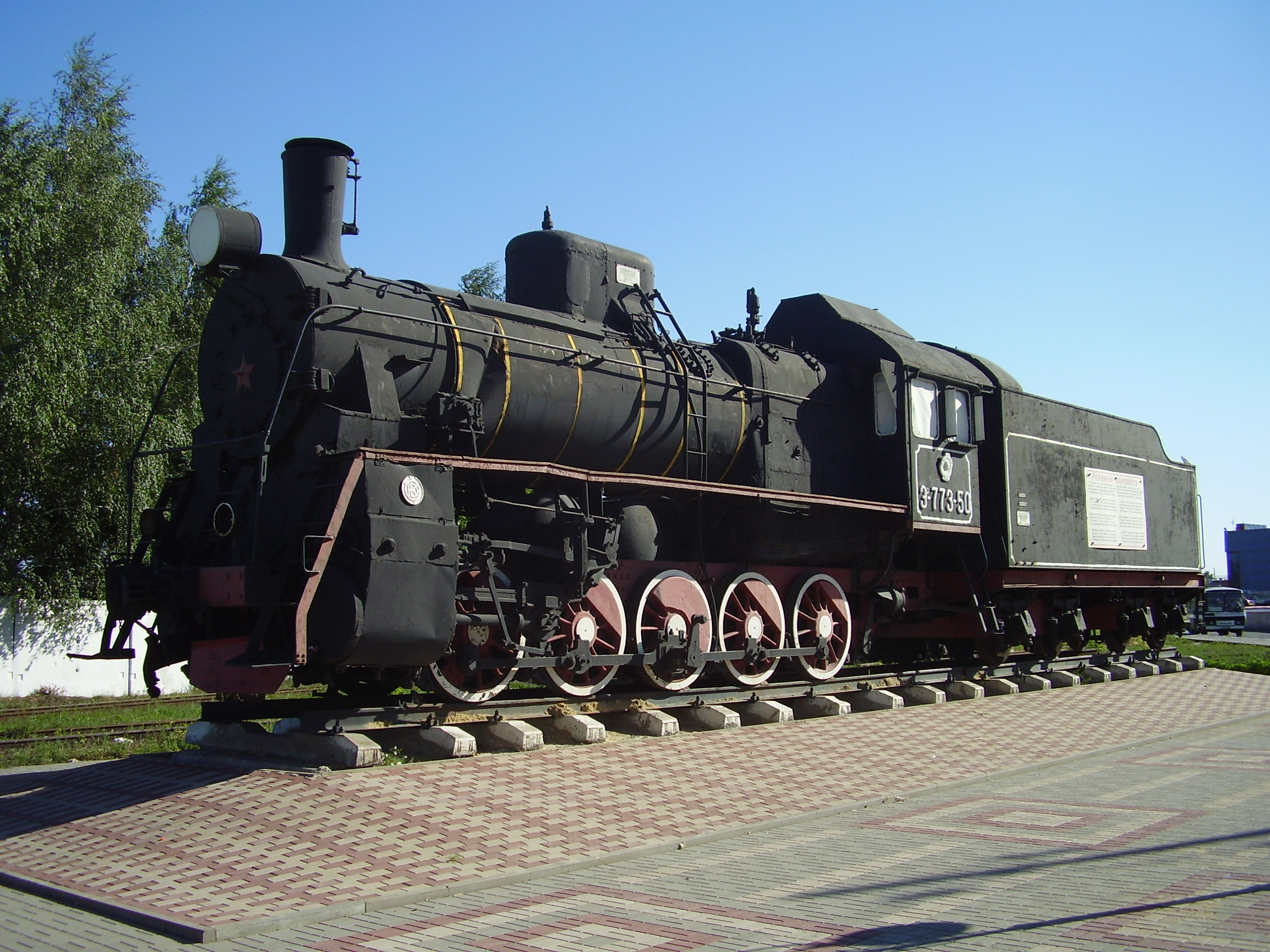 Паровоз-памятник у автостанции города Грязи